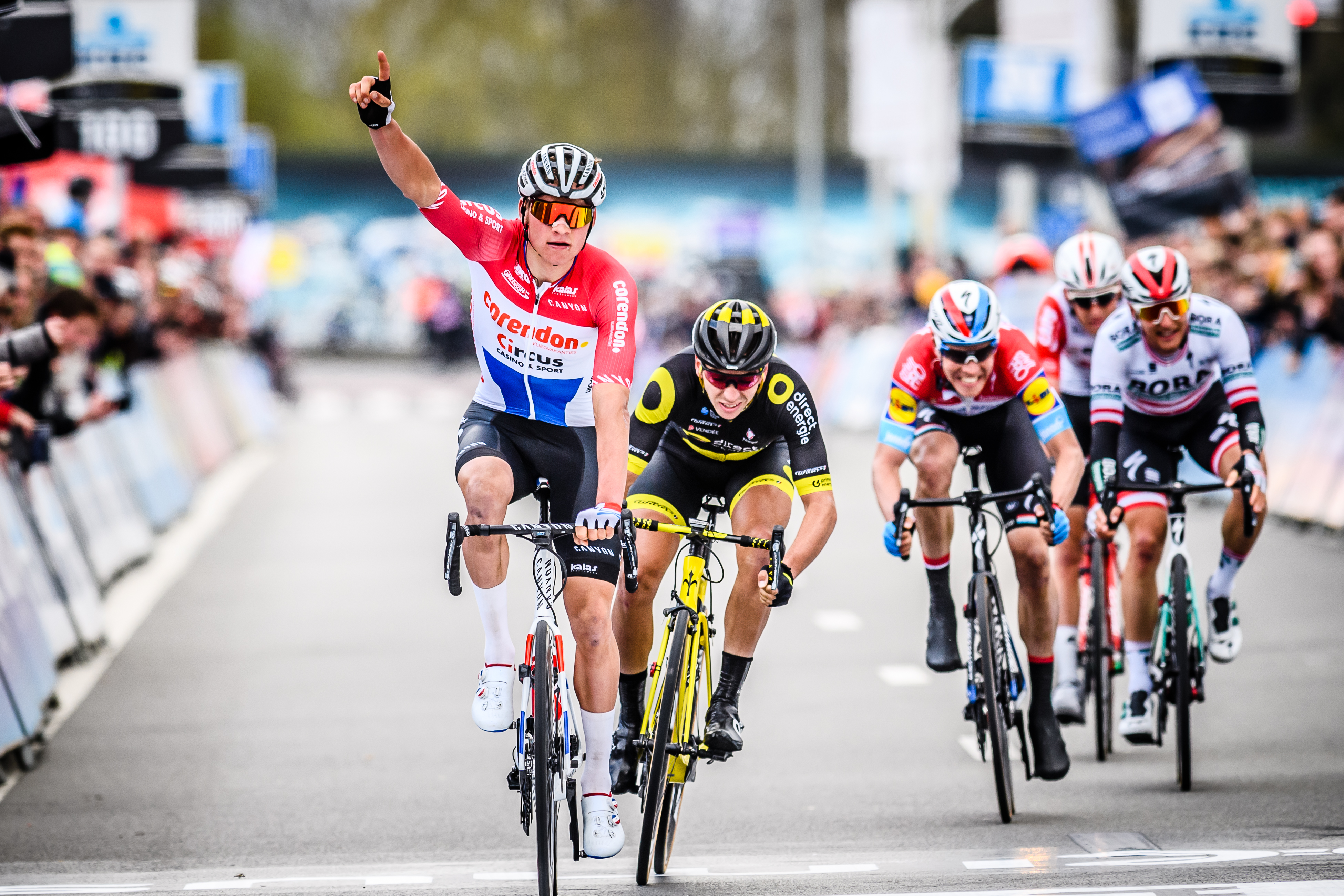 Mathieu van der Poel overschrijdt na 181 km triomfantelijk de finish. Hij geeft zij vier medevluchters Anthony Turgis, Bob Jungels, Lukas Pöstelberger en Tiesje Benoot het nakijken.